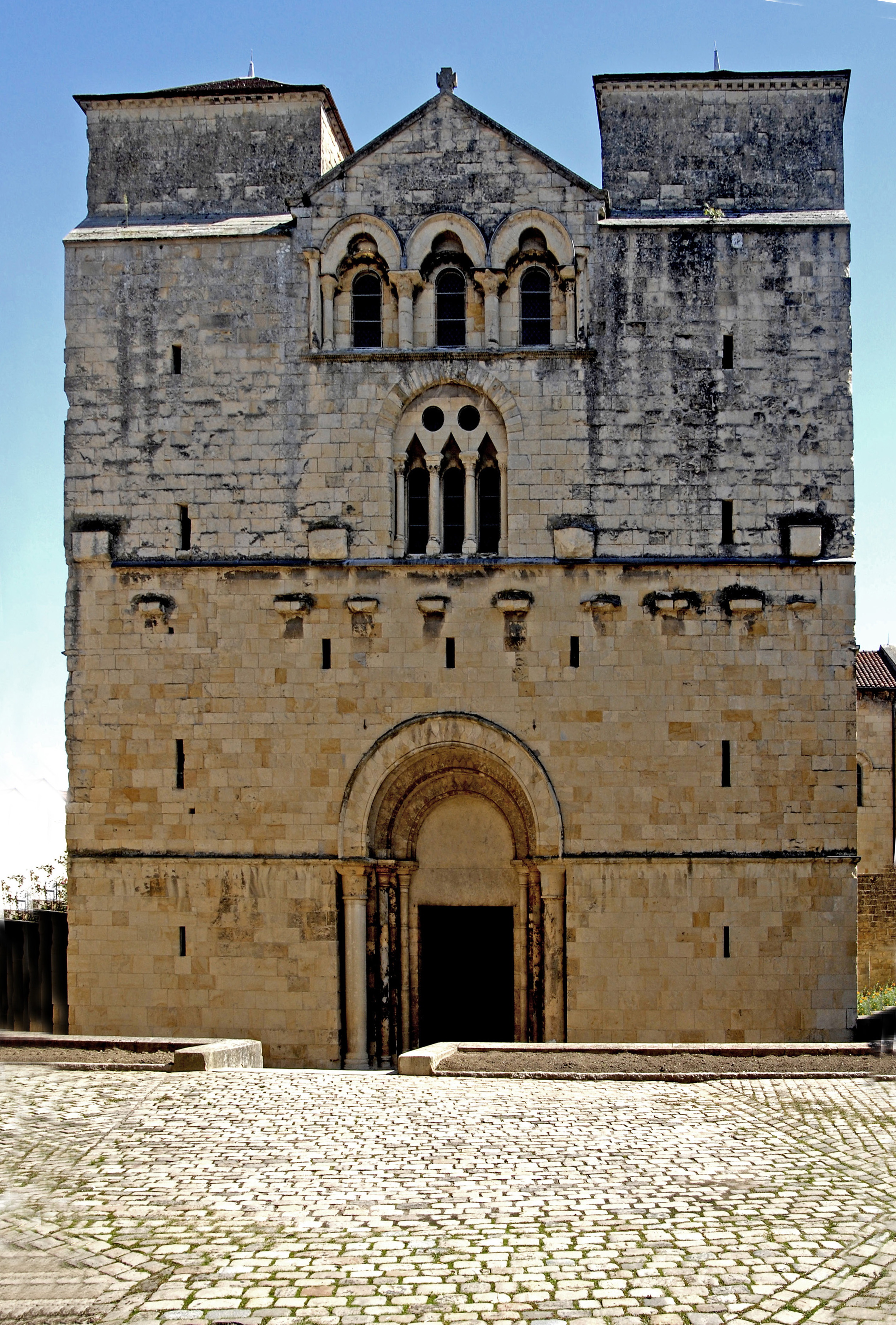 St.-Etienne Nevers, Fassade